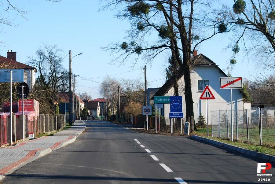 Widok od strony Hat'i na Rudyszwałd. Jak można zauważyć, wzdłuż ulicy ciągnie się się gęsta zabudowa, a granica państwa często jest granicą między sąsiednimi posesjami.